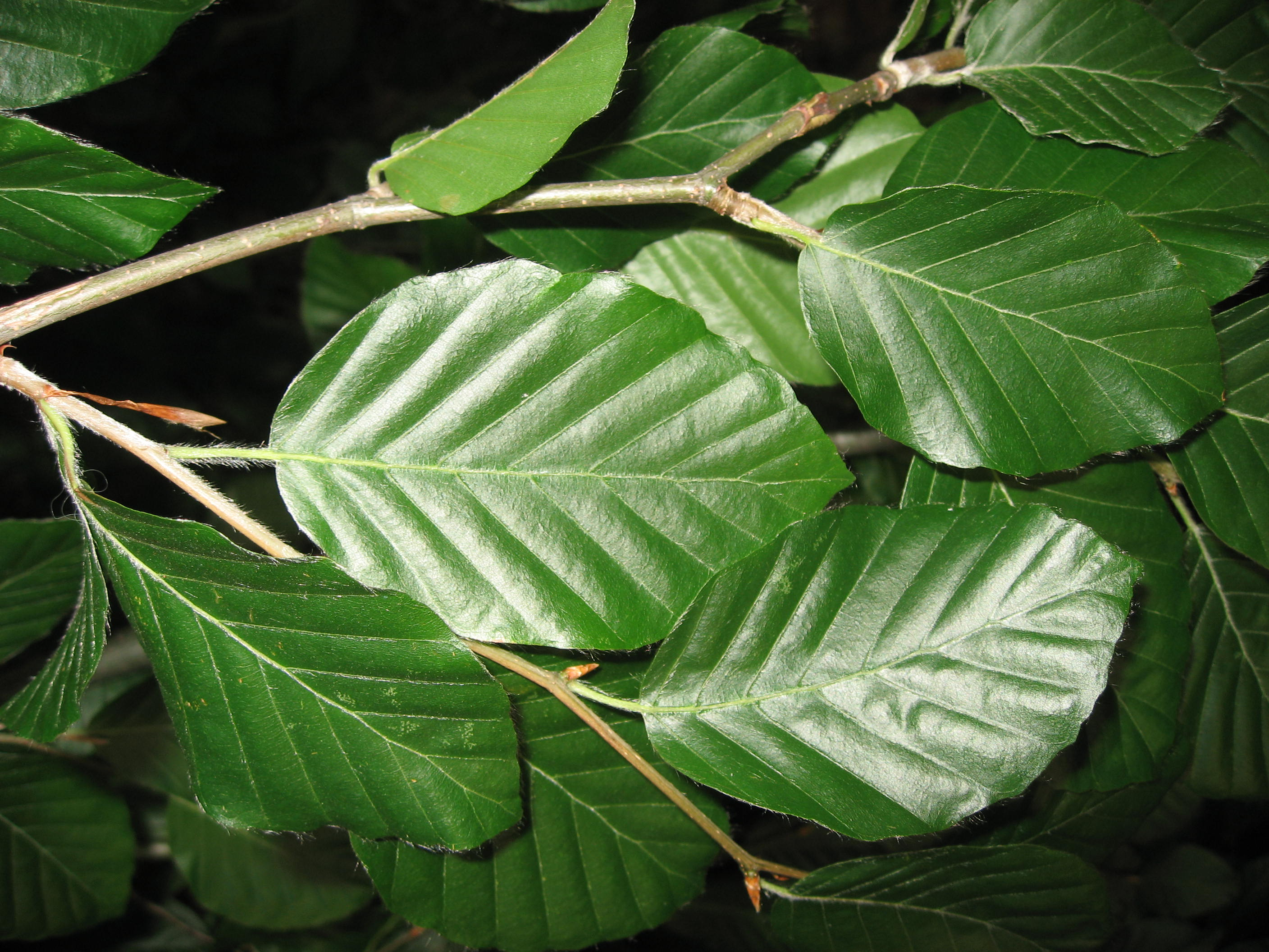 Fagus sylvatica 'Atropurpurea pendula' leaves in Giardino dei Semplici di Firenze Map: 43° 46' 45" N 11° 15' 39" E